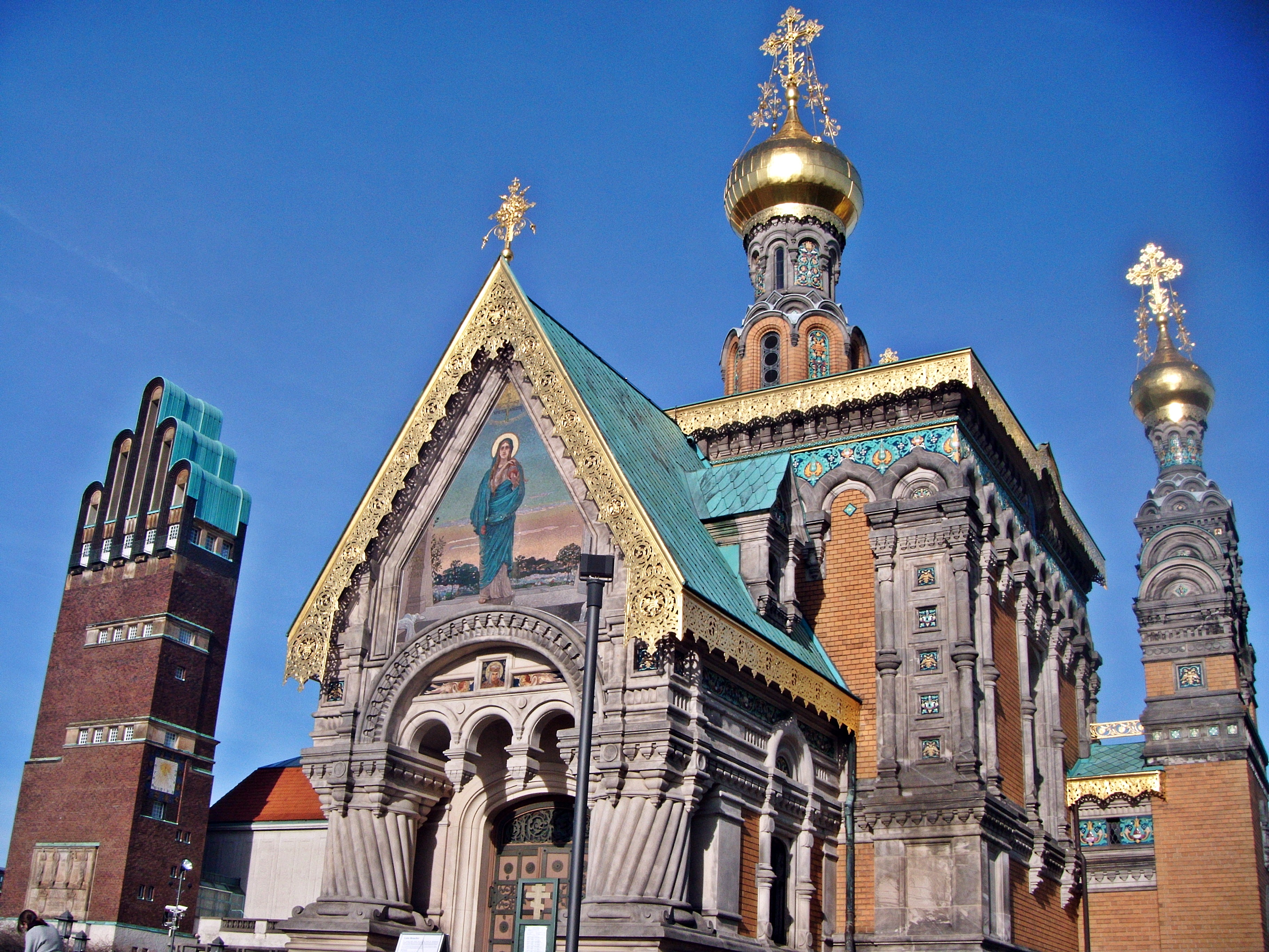 Darmstadt, Russische Kapelle und Hochzeitsturm